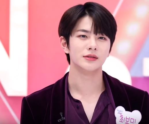 9일 오후 서울 마포구 상암동 tbs 오픈스튜디오에서 공개녹화로 ‘tbs 팩트인스타 – 골든차일드편’이 녹화가 진행됐다.